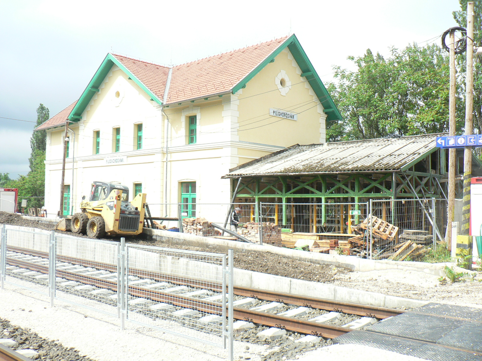 Pilisvörösvár - felújítják a nyári várót